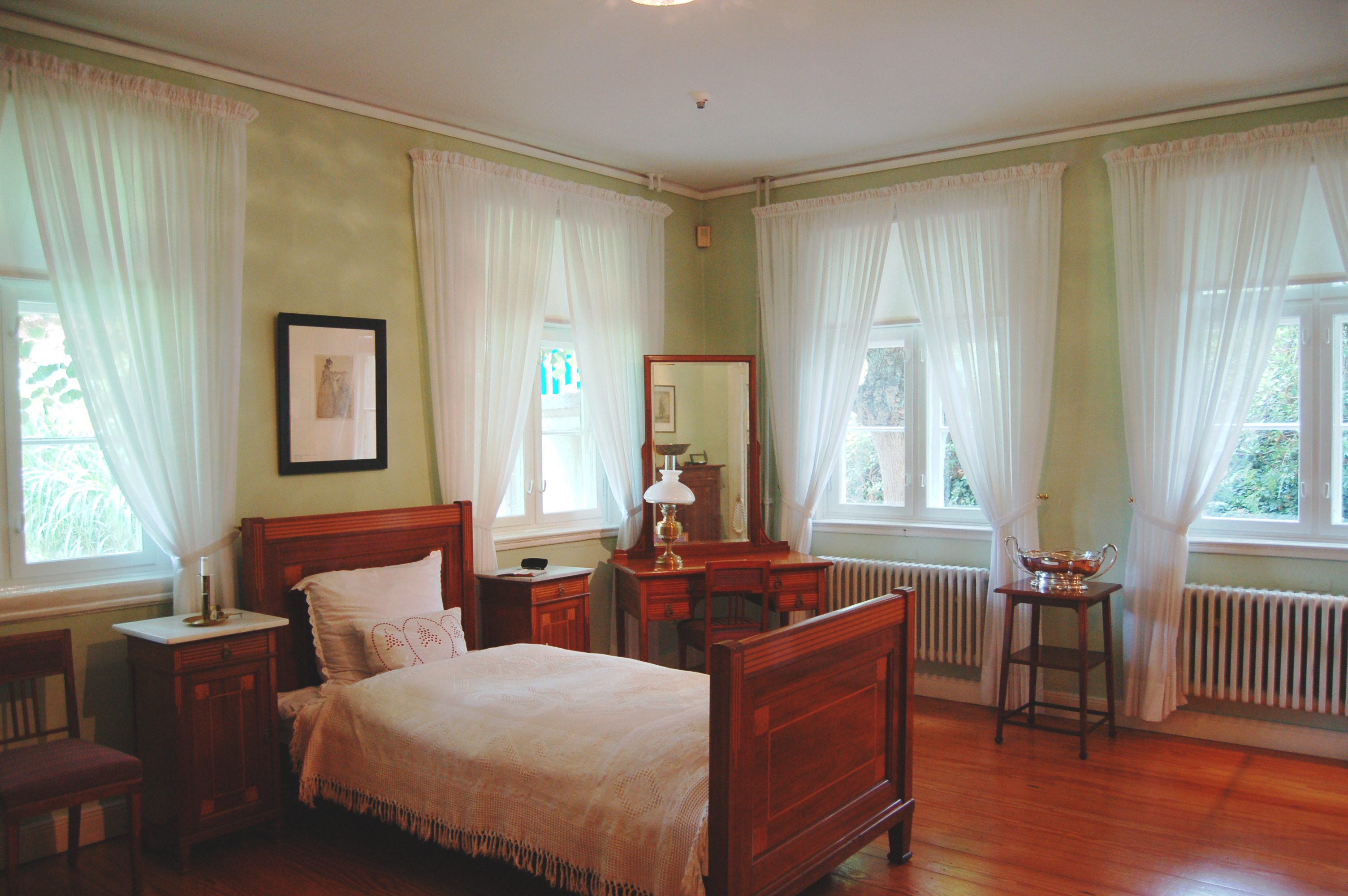 Museum Langes Tannen Uetersen - Schlafzimmer Neo-Biedermeierzeit um 1910